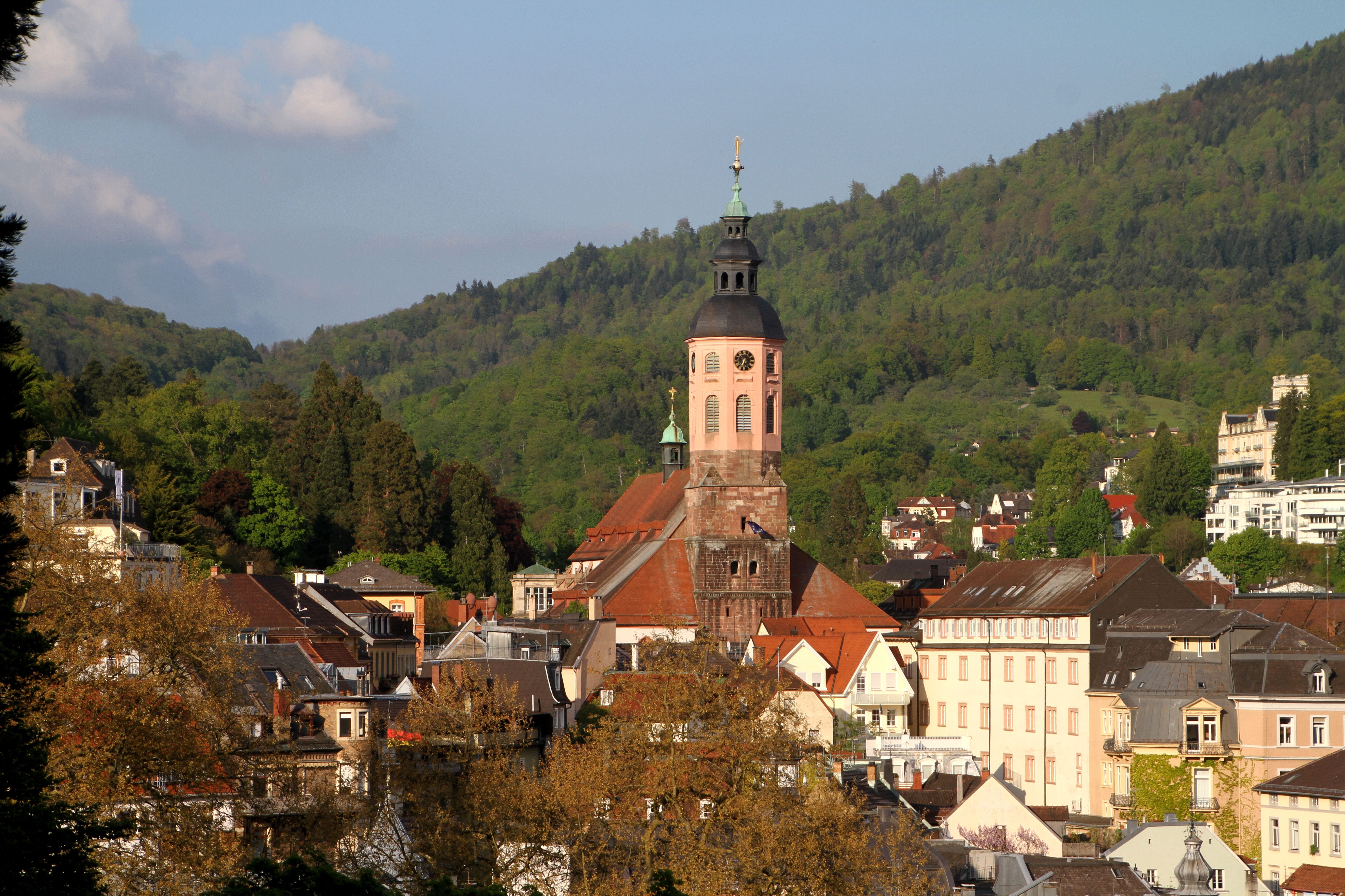 Ansicht von Baden-Baden.